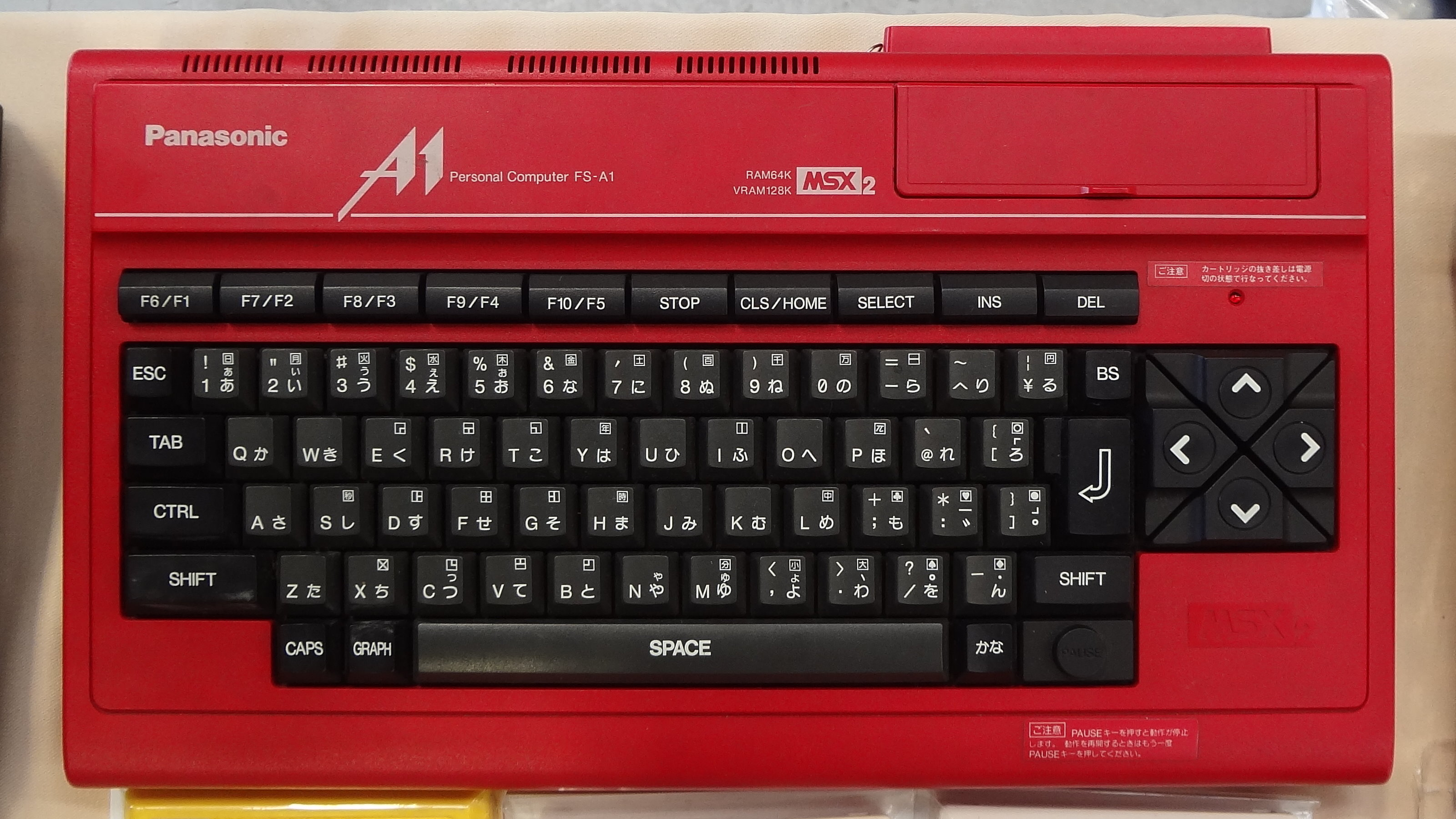 第28屆亞洲動漫創作展，夢幻之星遊樂器專賣店攤位展示的Panasonic FS-A1。